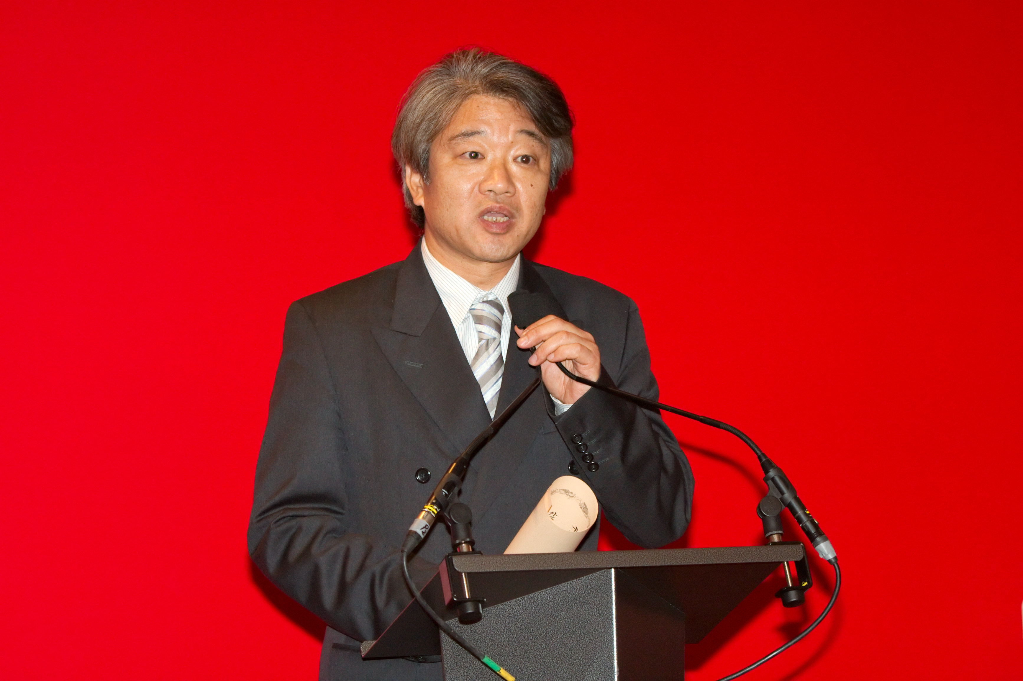 Prix du "Ministère des Affaires Étrangères du Japon" remis à la SEFA par M. Hirotaka Watanabe (Ministre et Directeur du Service Culturel et d'Information de l'Ambassade du Japon à Paris) durant Chibi Japan Expo 2009 (Paris, France).